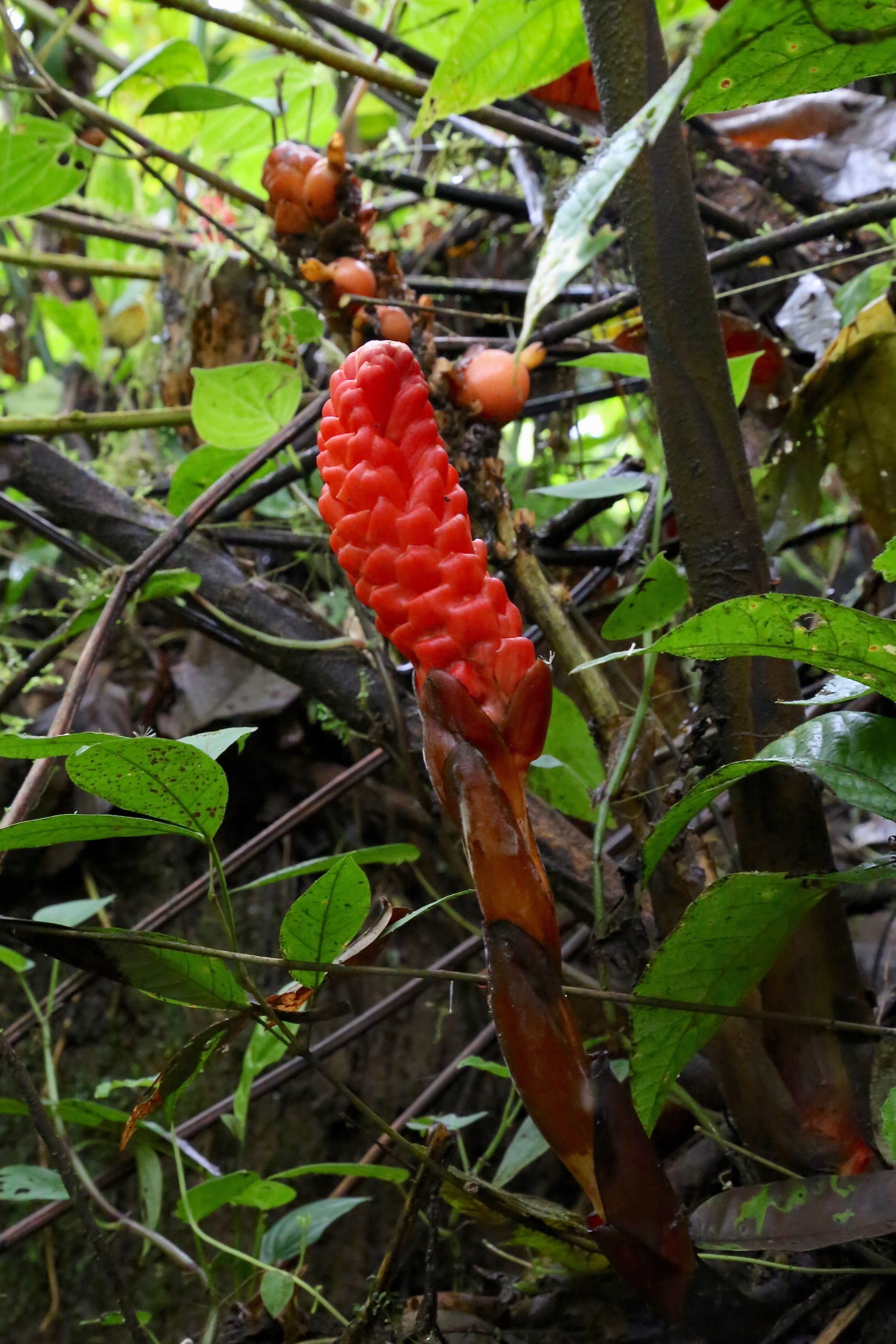 Ecuador, Tungurahua, El Topo, Río Zuñag.